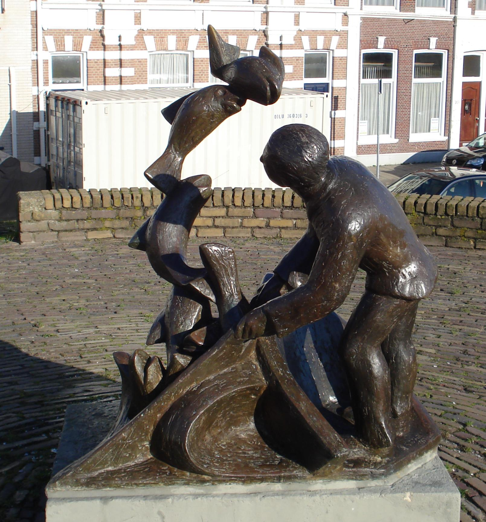 Den Haag, Badhuiskade. Kunstwerk "De wonderbare visvangst" van Sybilla Krosch. The Hague/The Netherlands.